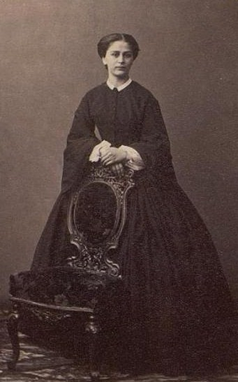 Любовь Сергеевна Свечина, ур. княжна Голицына (1841—1910)